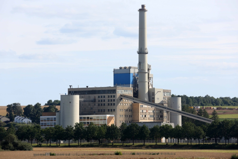 Kraftwerk Kassel: Block des Fernwärmekraftwerks Kassel (FKK), Dennhäuser Straße, Kassel